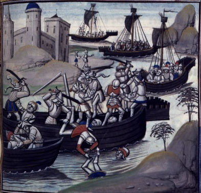 Bataille d'Alexandrie (1173). Guillaume II de Sicile débarque début août 1173 avec 200 navires et repart quelques jours plus tard ayant subi de lourdes pertes.